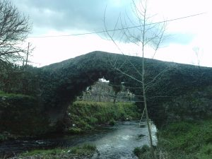 Felgueiras Jugueiros Ponte Medieval de Travassos